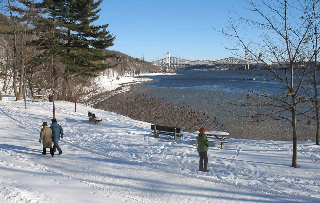 Plage-Jacques-Cartier à Cap-Rouge, arrondissement Sainte-Foy–Sillery–Cap-Rouge, ville de Québec (Québec) Canada